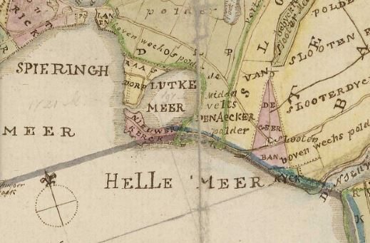 Detail van een kaart van omstreeks 1790 van J de Sauvage en Kl. Vis, met daarop het bovendeel van de Haarlemmermeer